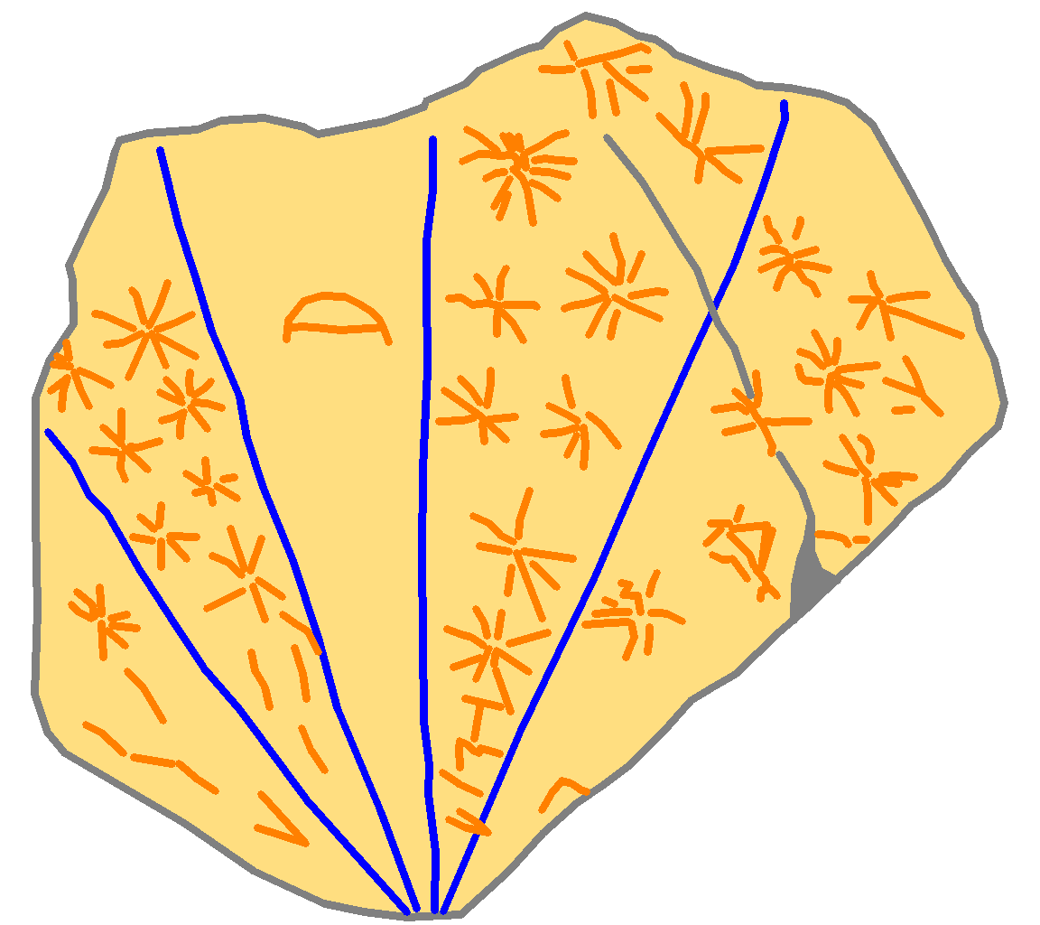 Skizze der Himmelstafel von Tal-Qadi